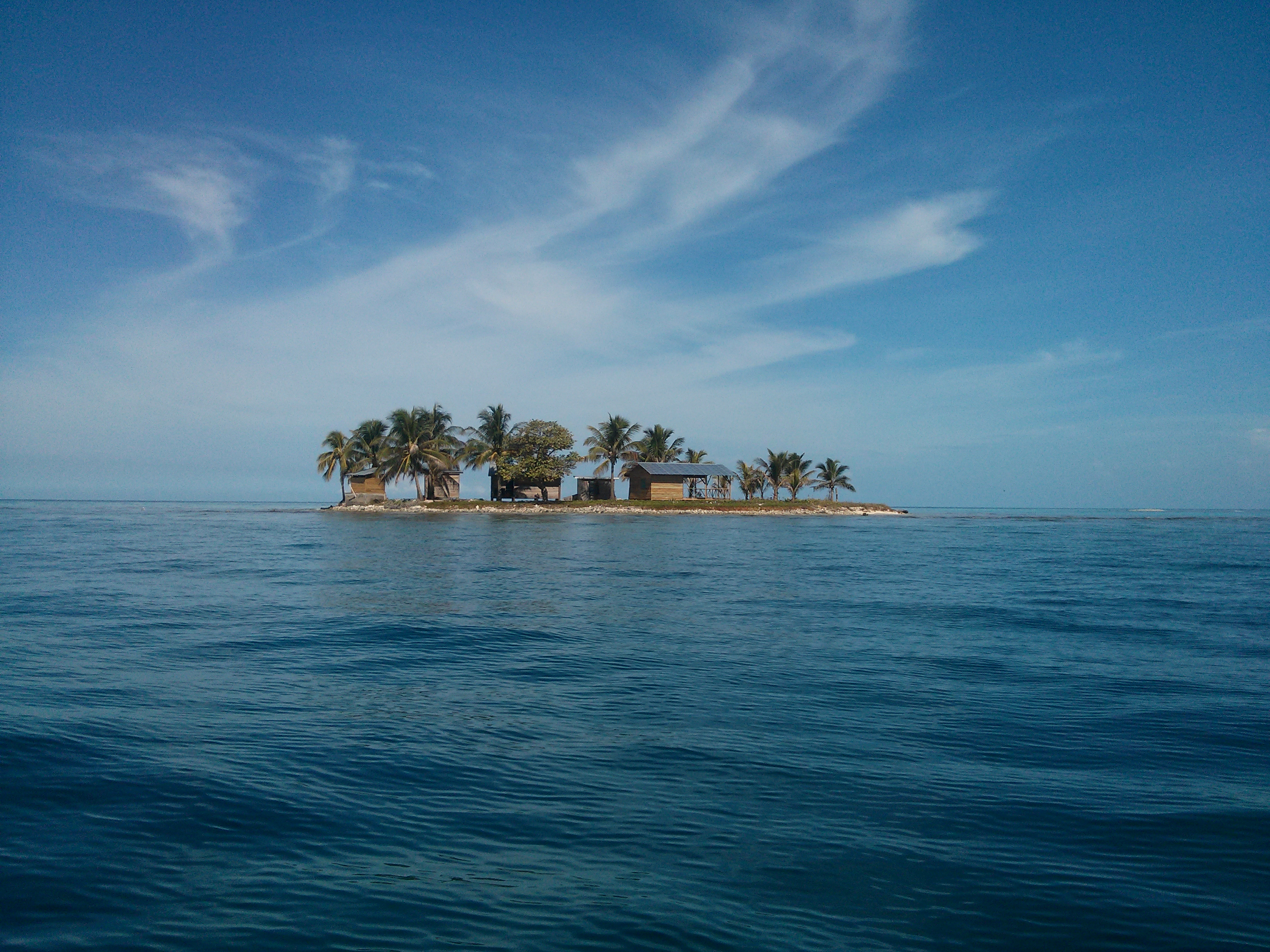 Fotografía tomada desde lancha a Cayo Privado. Picture taked from a boat to a private Cay.